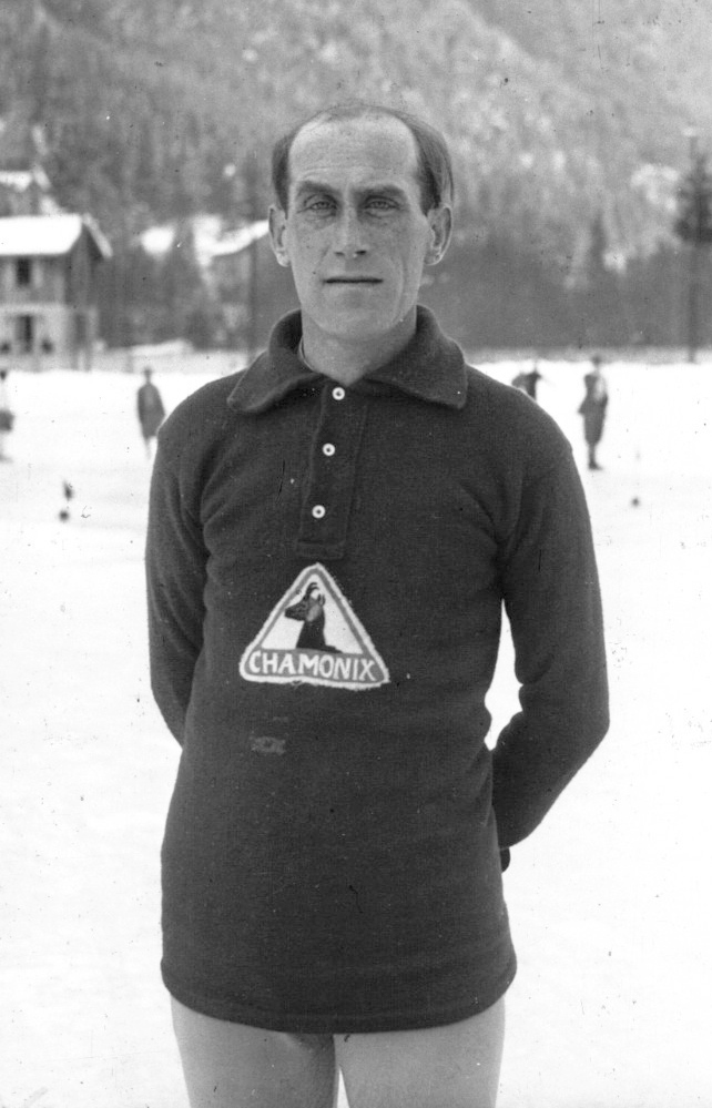 Chamonix : championnat de France de patinage : Quaglia, champion de France : [photographie de presse] / Agence Meurisse